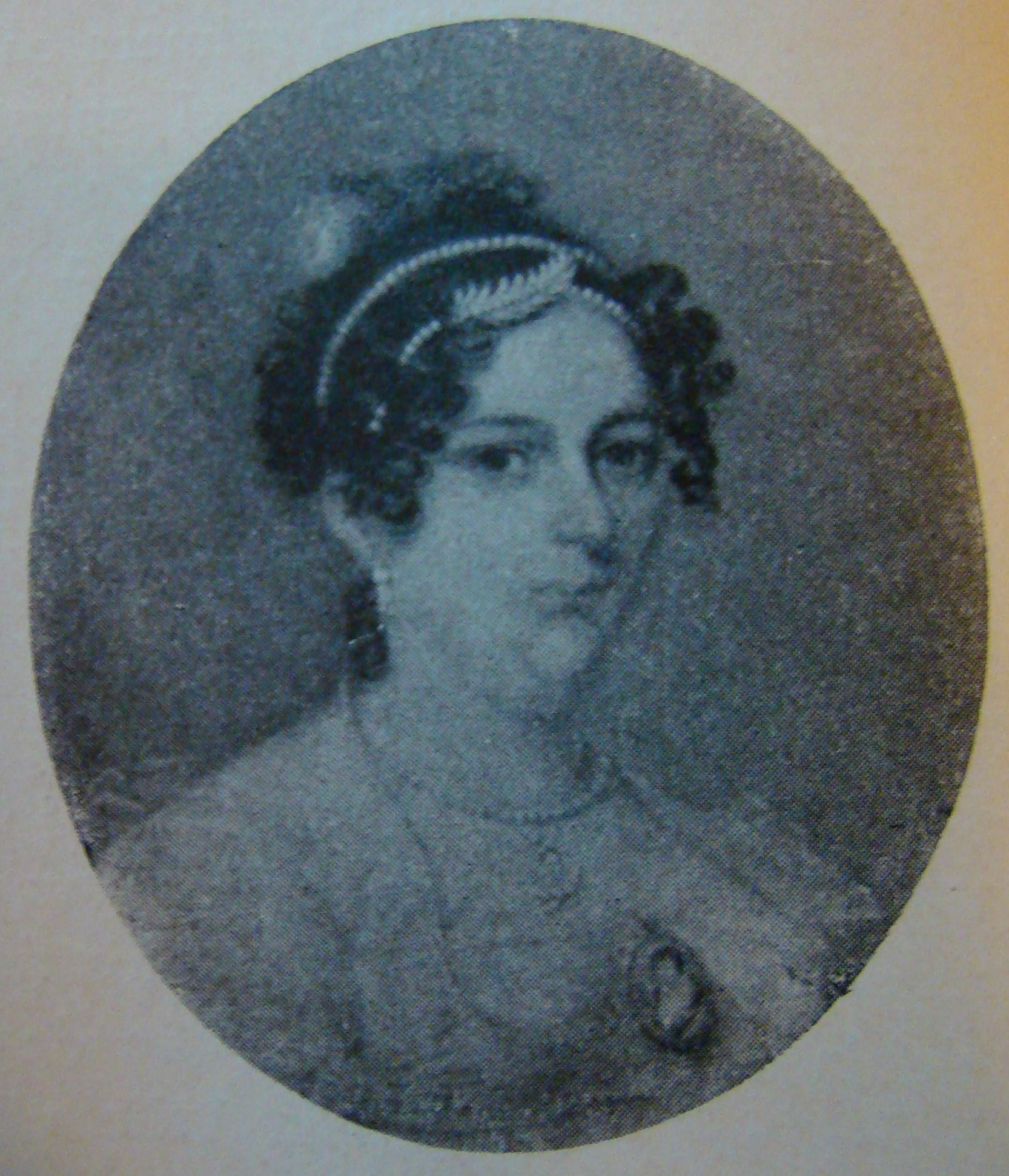 María Eugenia Escalada de Demaría, Patricia Argentina